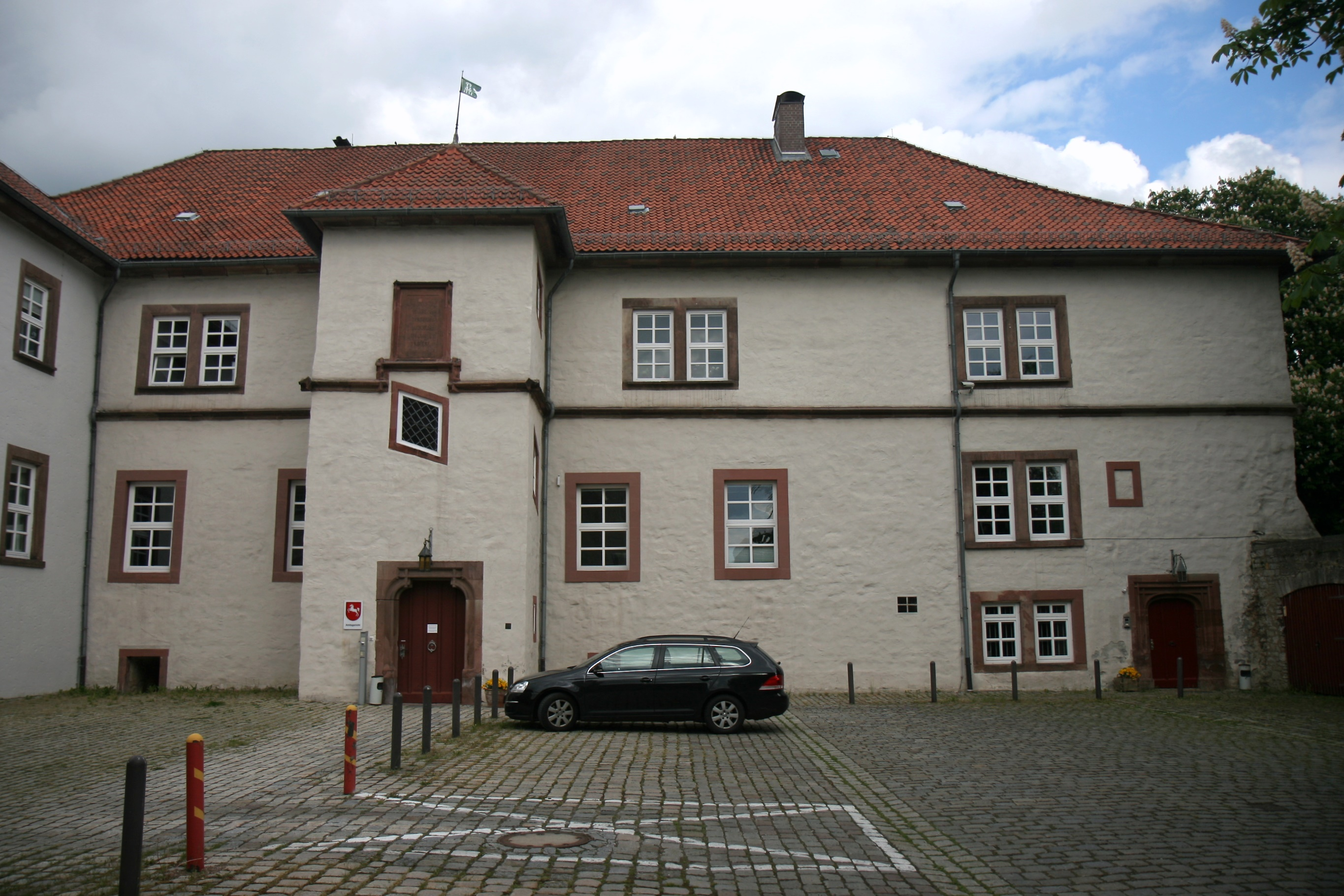 Gebäude des Amtsgerichts Bad Gandersheim, Herrenhaus der Burg, Am Plan 3 b in Bad Gandersheim.